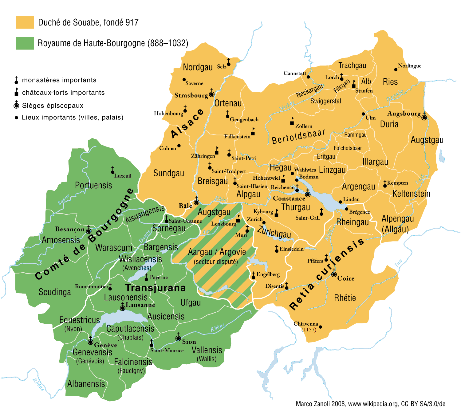 Le duché de Souabe et le royaume de Haute-Bourgogne durant le dixième siècle